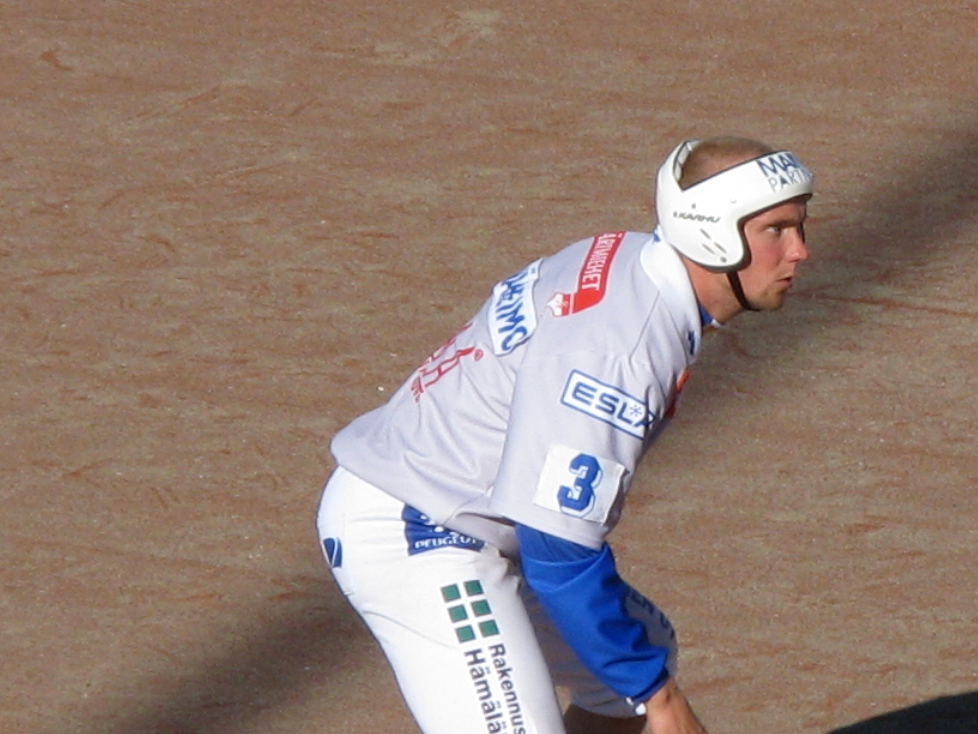 Description